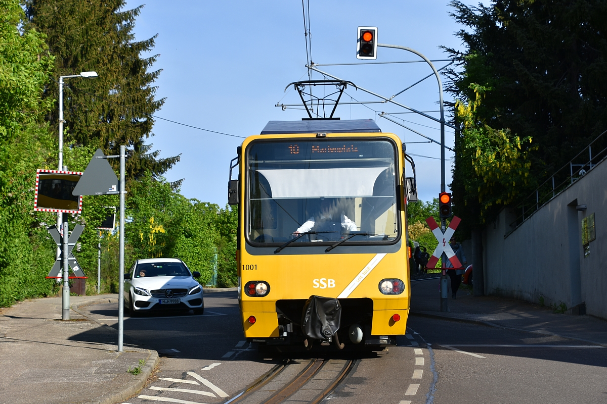 Automotrice n° 1001 franchissant l'Alte Weinsteige, sous l'arrêt Pfaffenweg.